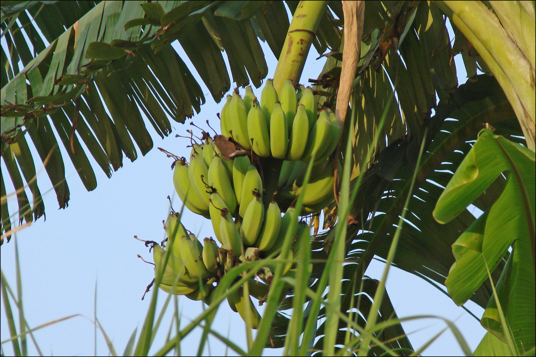 Bananes (baie d'Halong terrestre)